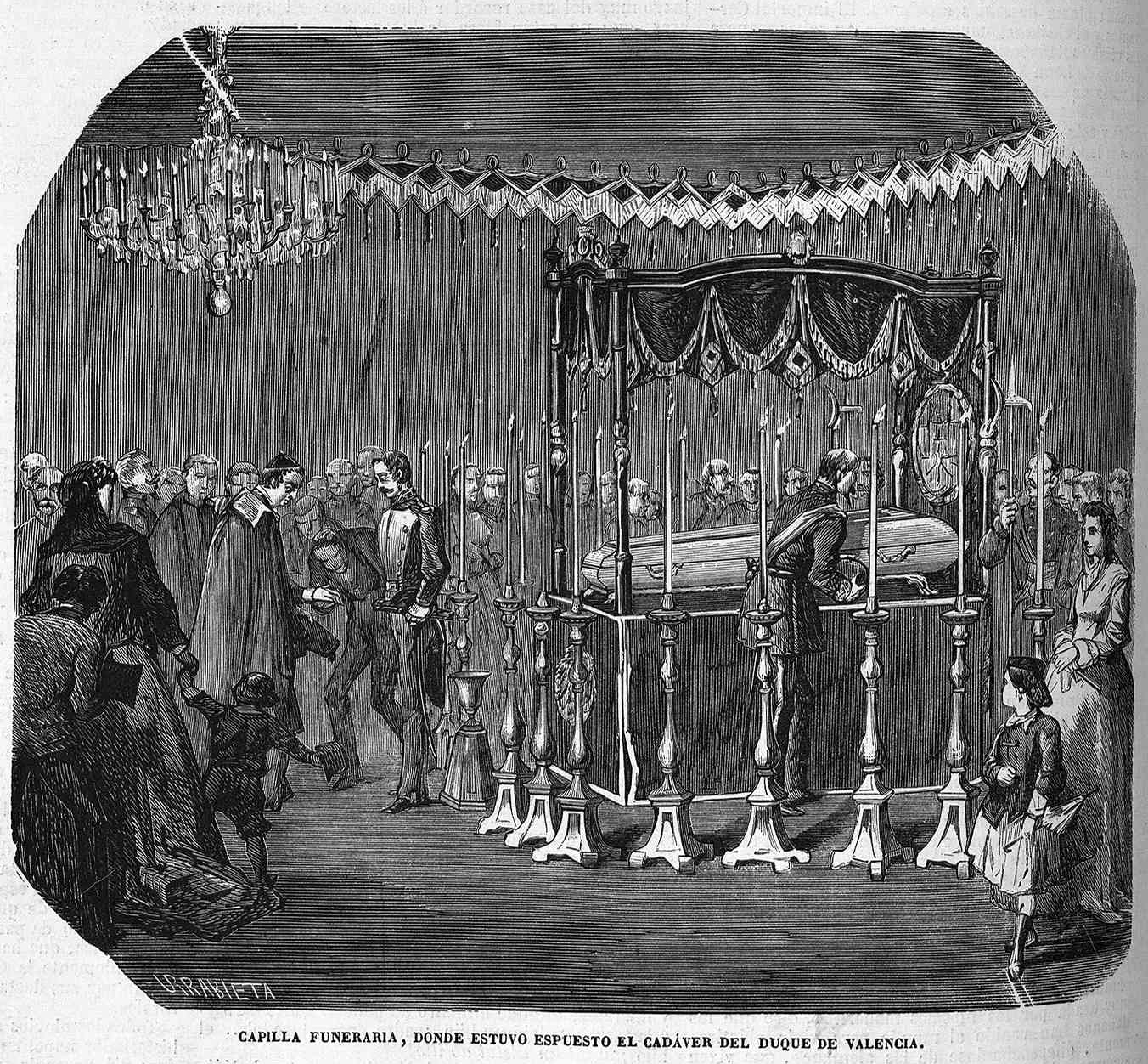 Capilla funeraria, donde estuvo espuesto el cadáver del duque de Valencia, en la revista española El Museo Universal.